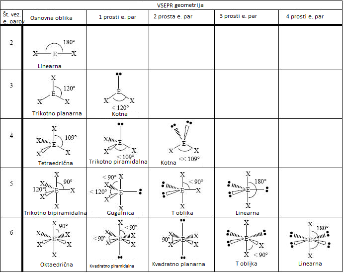 Prevod oblike molekul